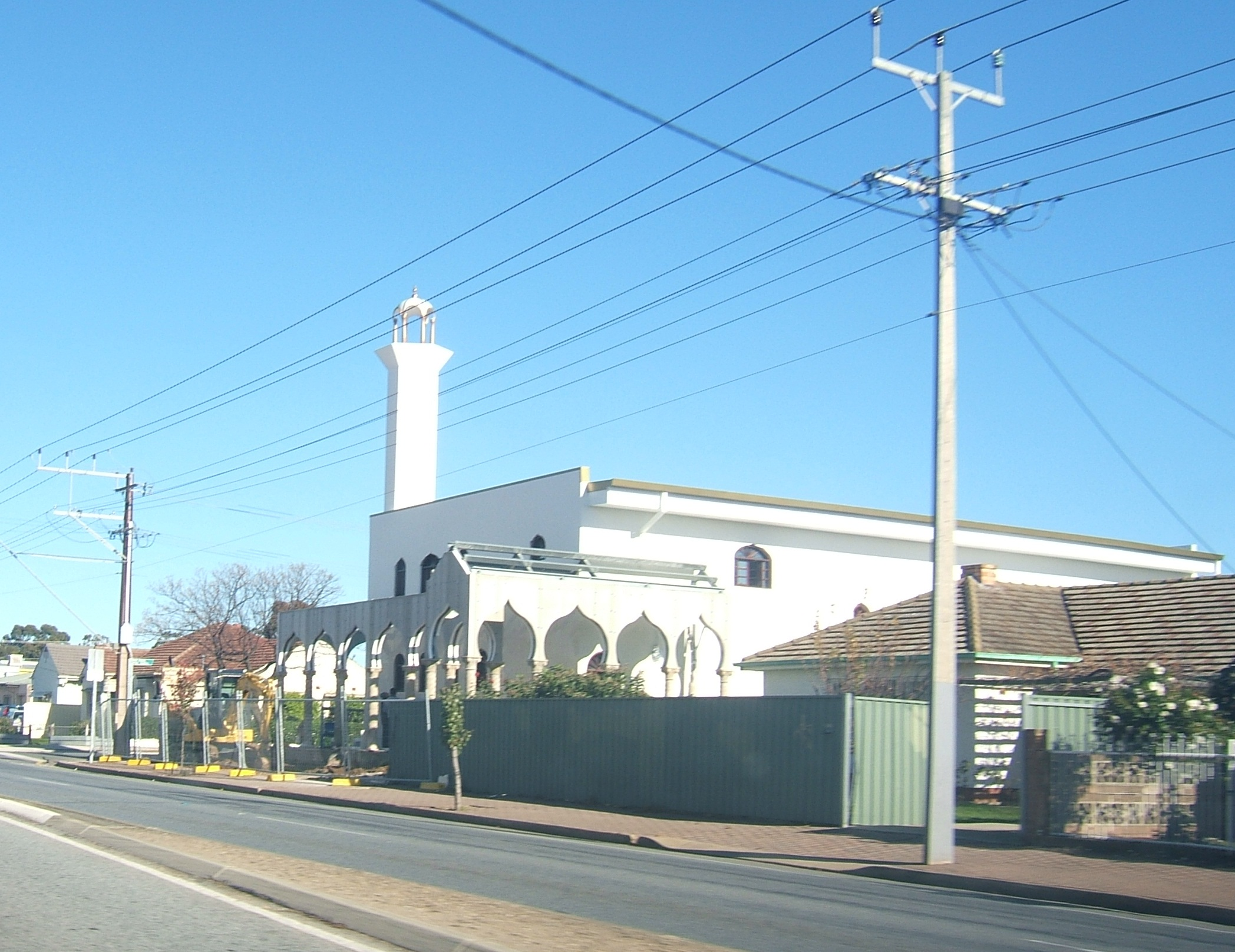 Park Holme, Adelaide